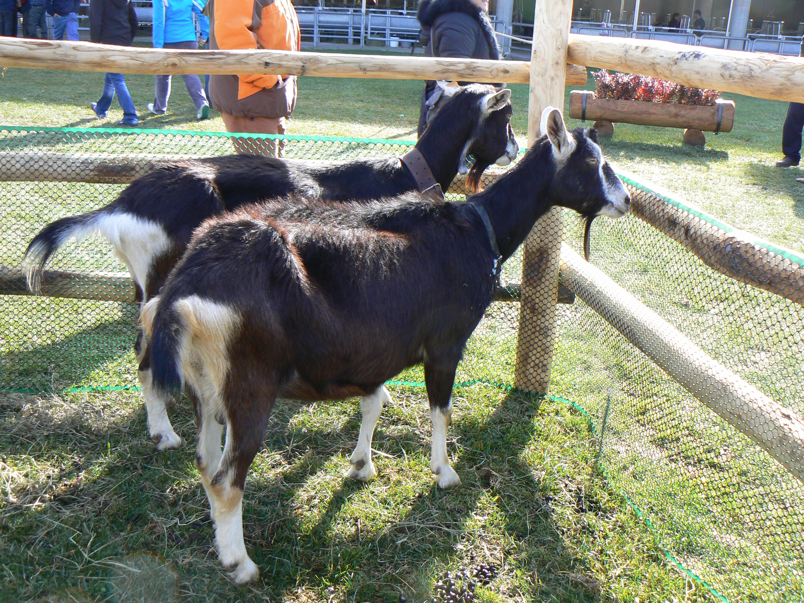 Capra Frisa Valtellinese alla Fête des Alpes 2011, ad Aosta.